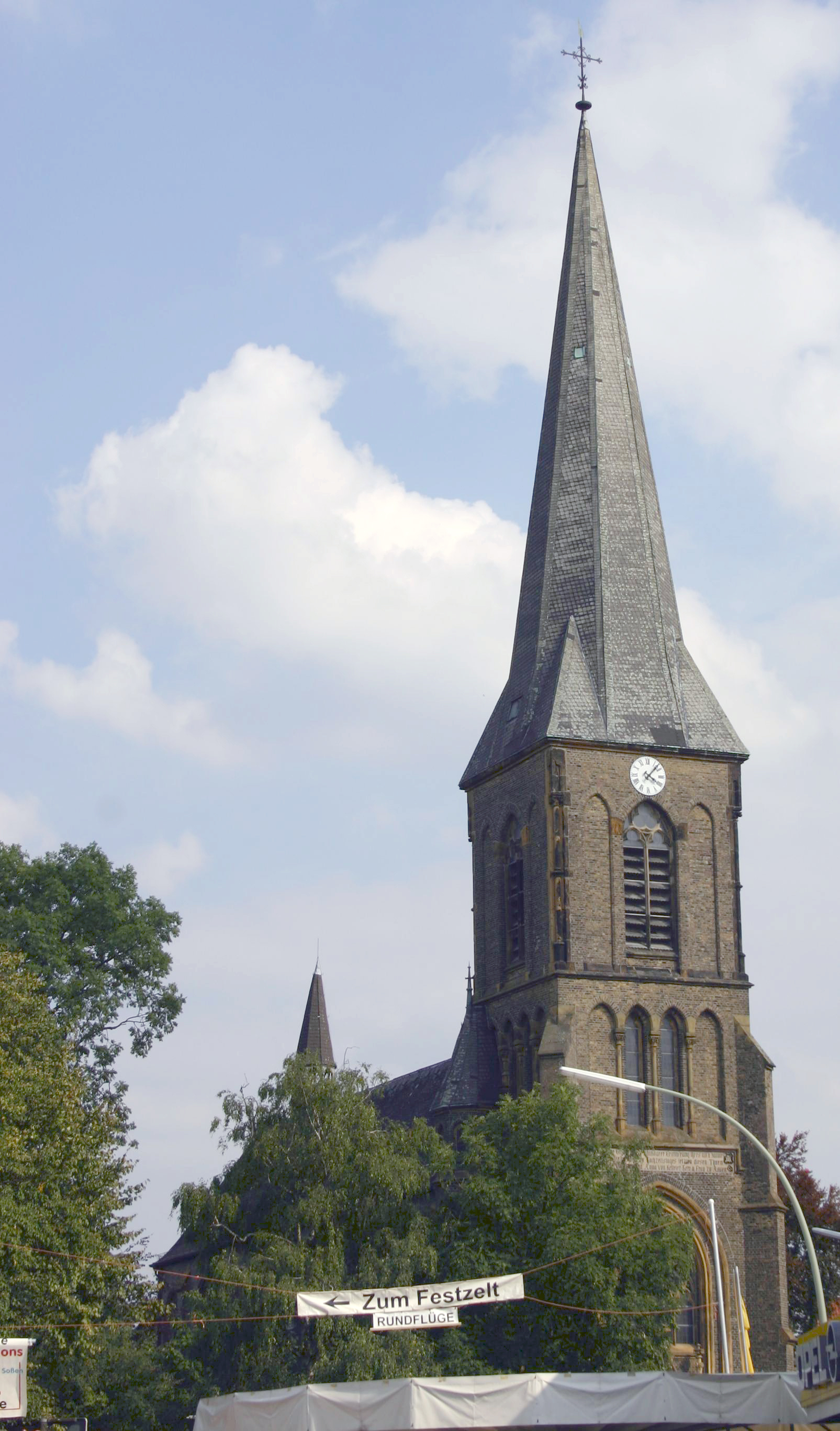 Die St.-Cornelius-und-Cyprianus-Kirche in Lippetal-Lippborg.